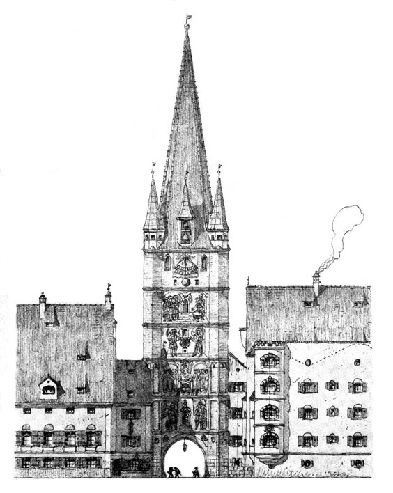 Abb. 35. Der schöne Turm (Innenansicht).